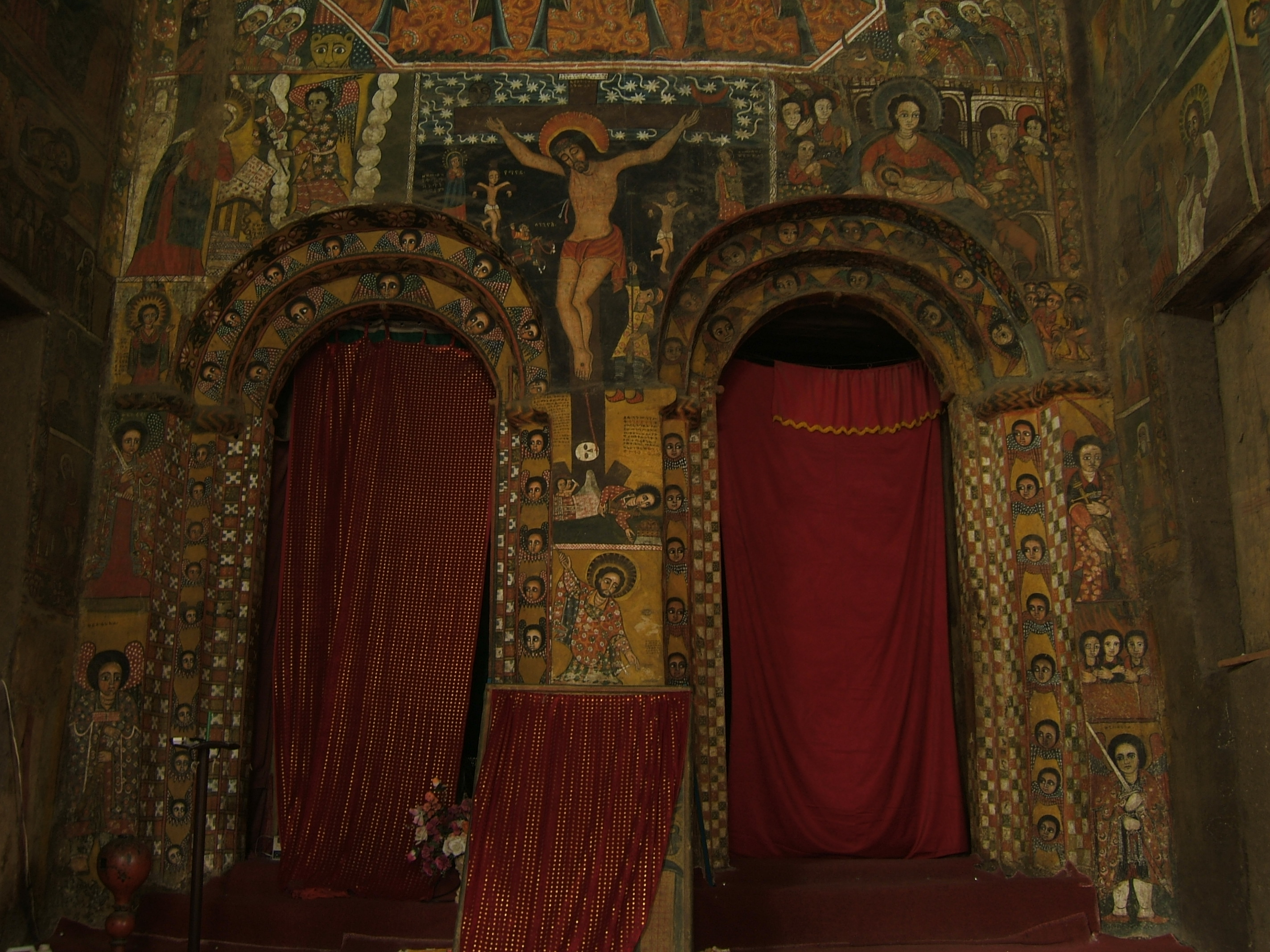 Inside Debre Berhan Selassie church